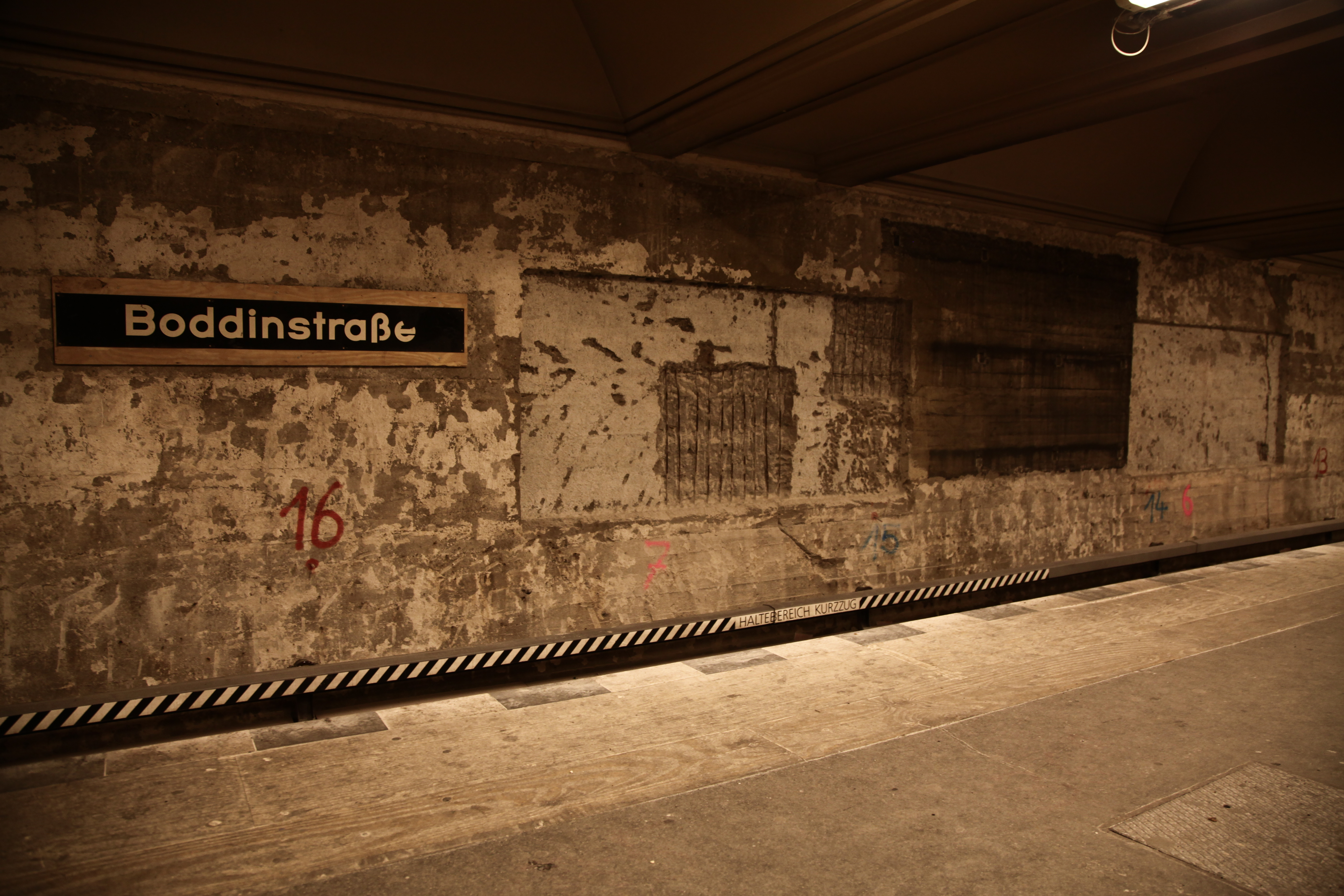 Berliner U-Bahnhof Boddinstraße während der Sanierungsarbeiten im Dezember 2012